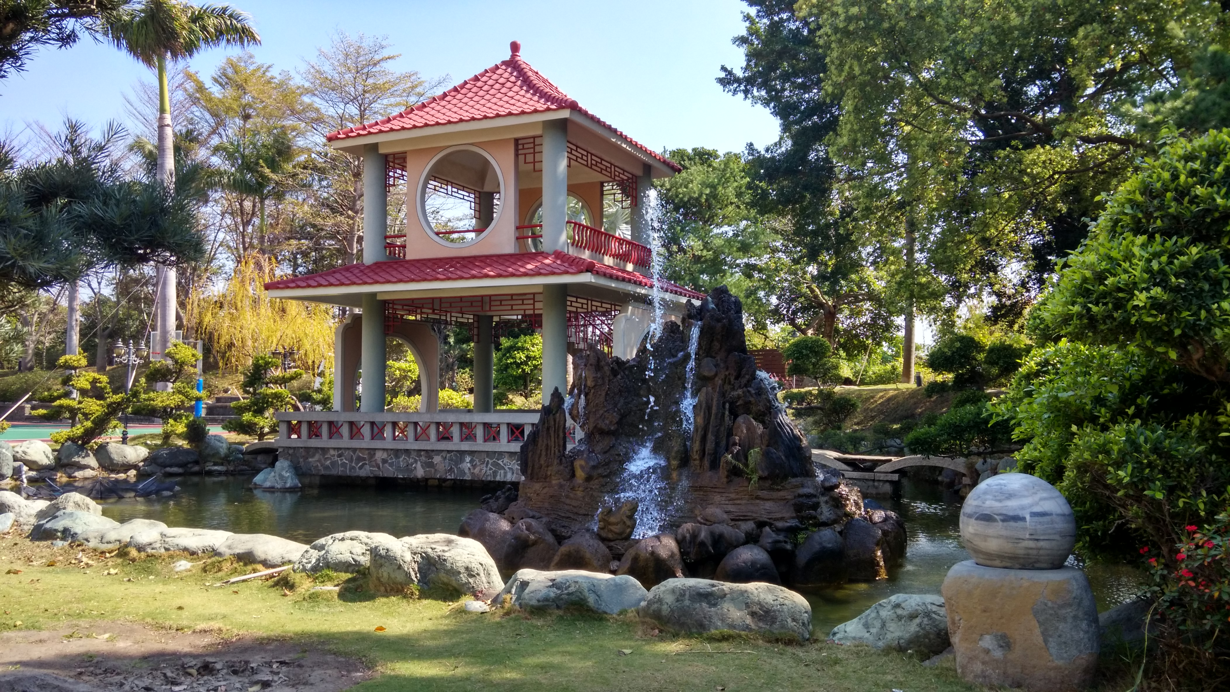 中文（台灣）: 建國科大綠崗湖